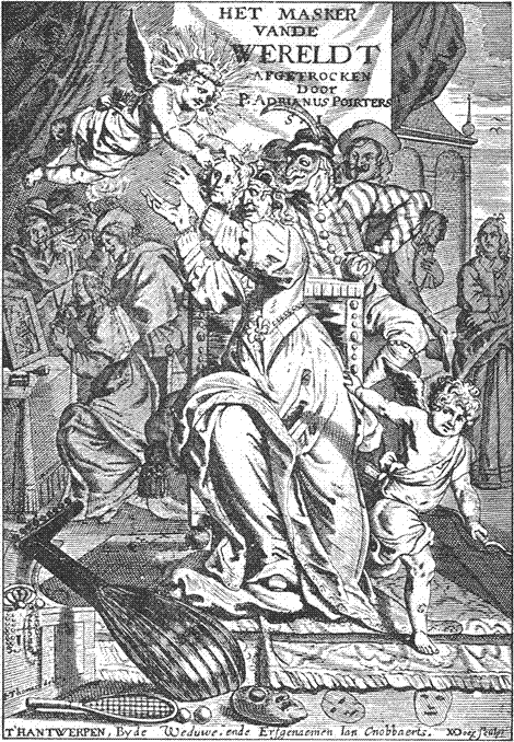 Titelpagina_van "Het Masker van de Wereldt afgetrocken door Adriaen Poirters; gravure van_A. van Does naar een tekening van I. Thomas